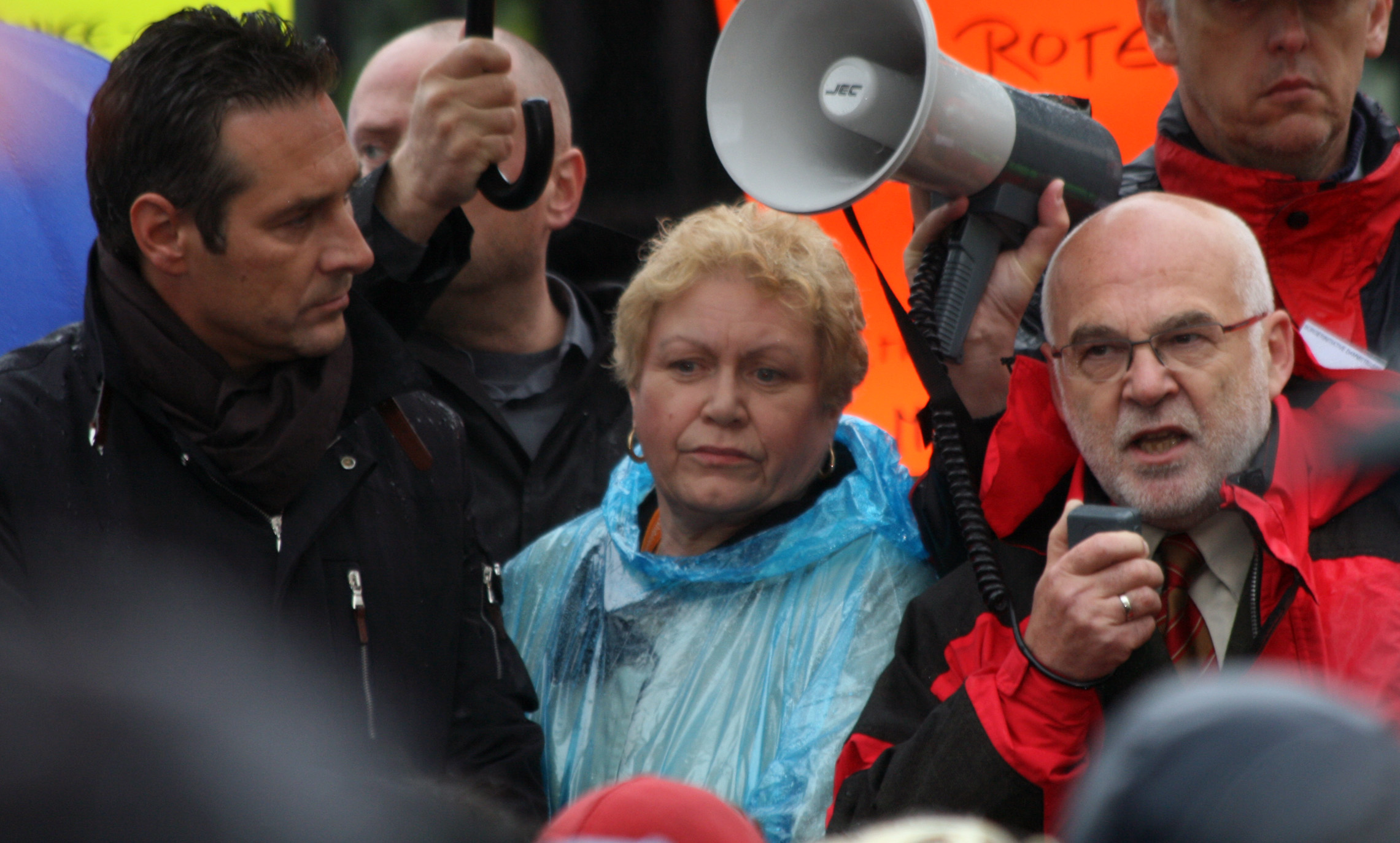 Heinz-Christian Strache (FPÖ), Hannelore Schuster (Bürgerinitiative Dammstraße) und Rudolf Gehring (Die Christen) während einer Demonstration gegen den Ausbau eines islamischen Kulturzentrums in Wien-Brigittenau (Ballhausplatz).